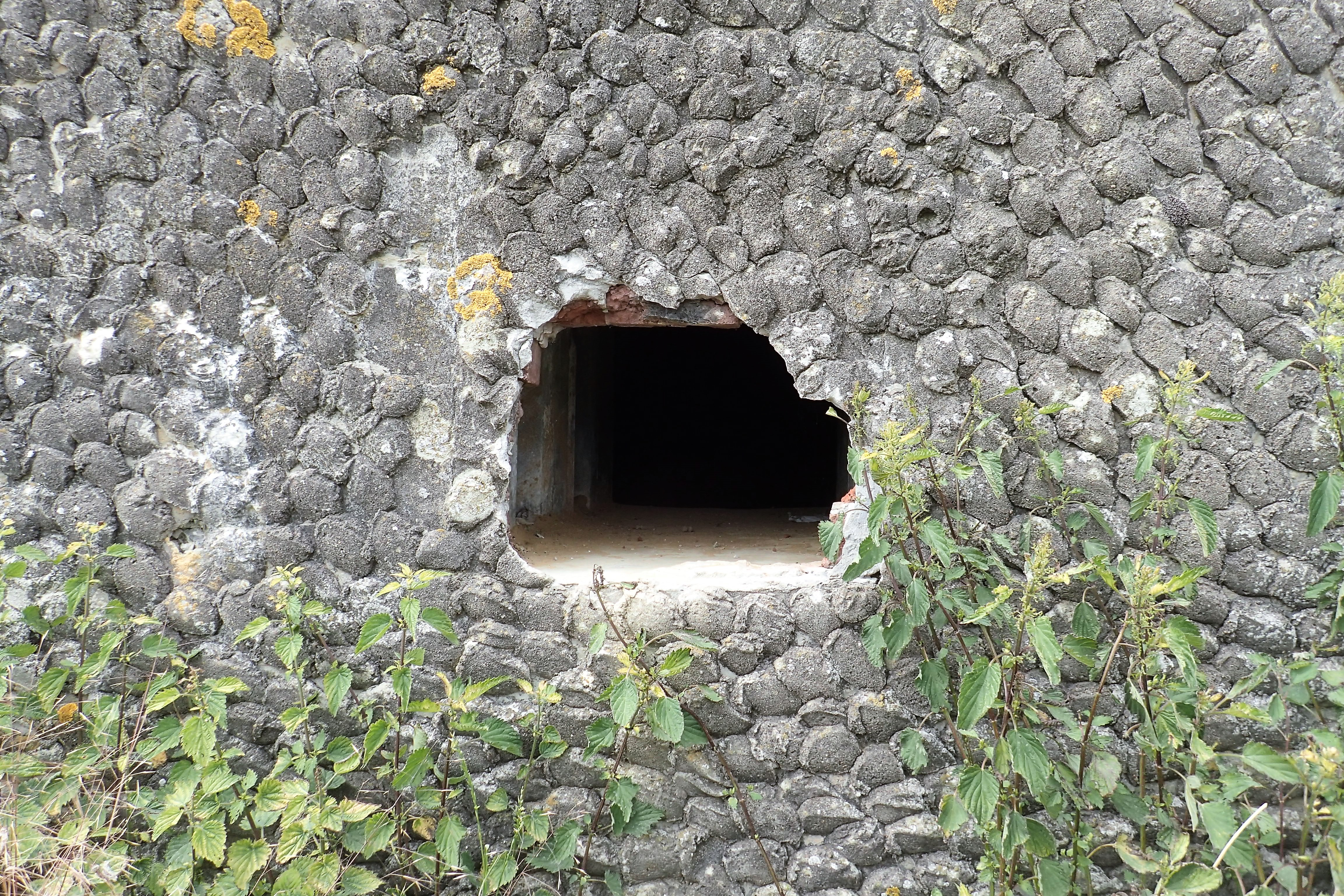 Bunker Ni6 - Begaardenstraat